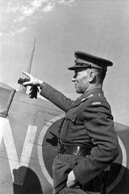 Wilhelm von Tangen Hansteen (1896-1980) jurist, offiser, forsvarssjef